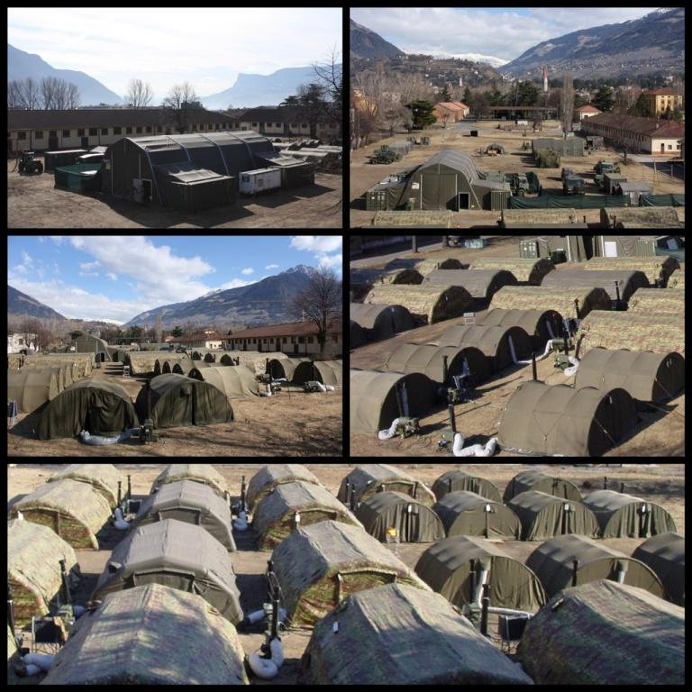 Attendamento